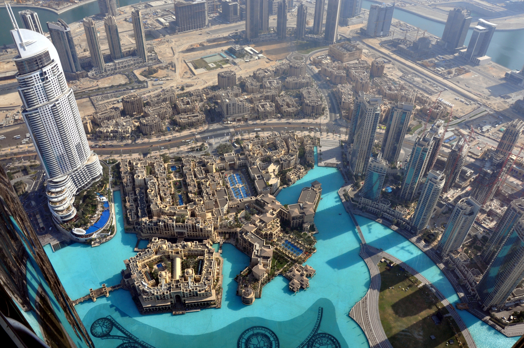 Dubai, Burj Khalifa, Aussichtsplattform